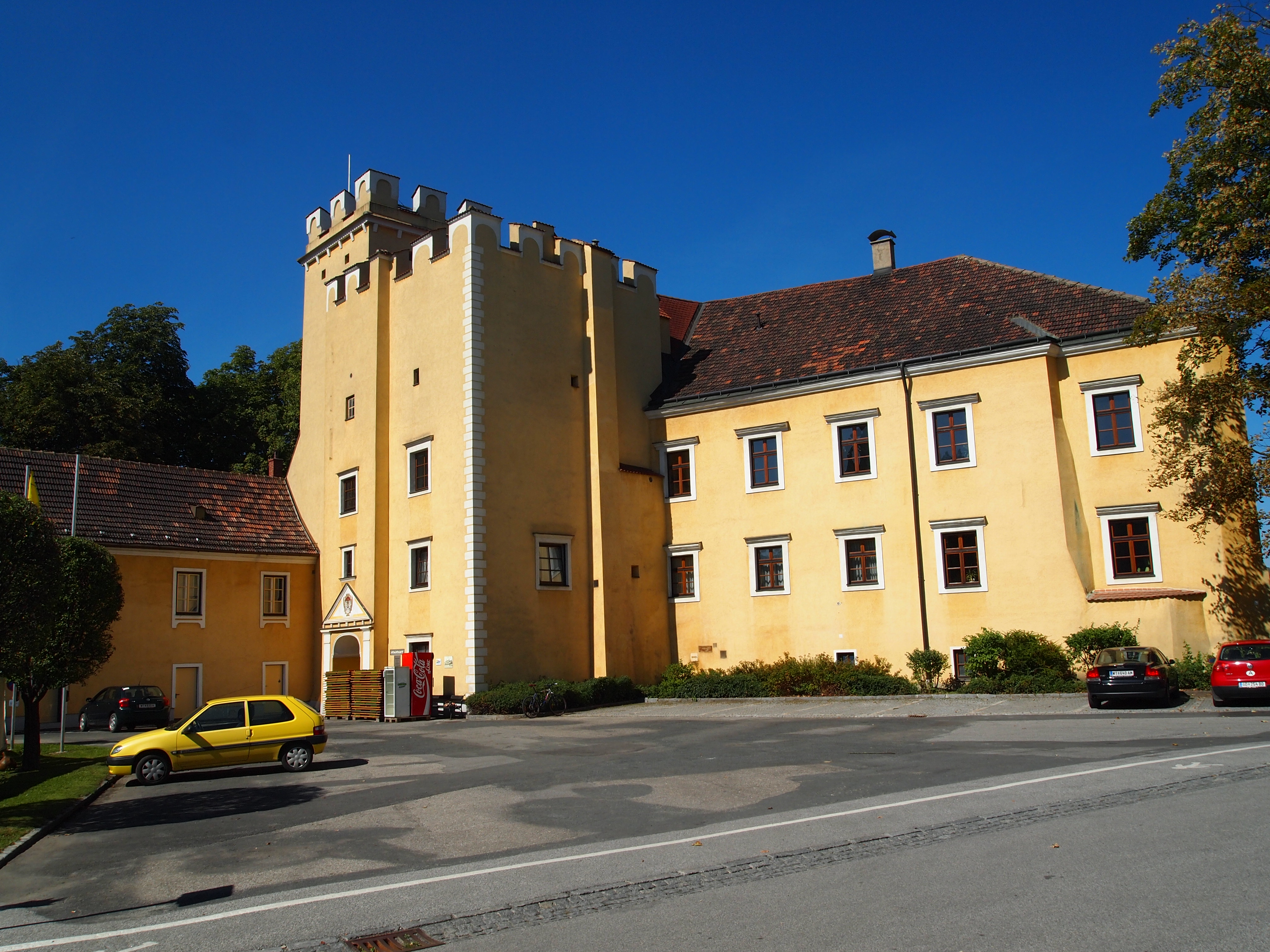 Schloss